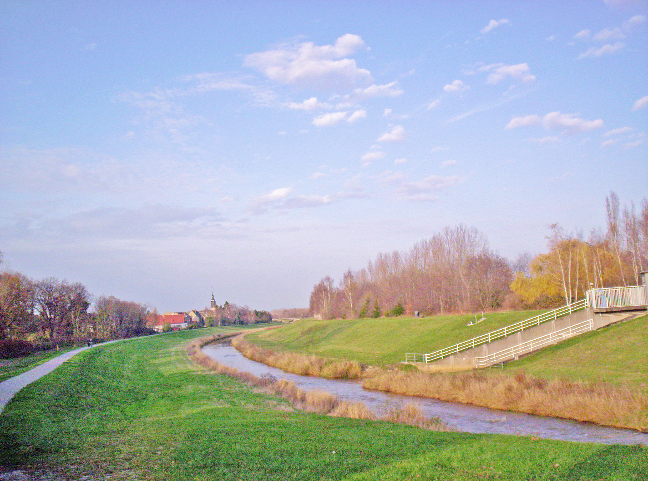 Pleiße bei Großdeuben (Blickrichtung Norden), rechts das Auslaufbauwerk des Rückhaltebeckens Stöhna